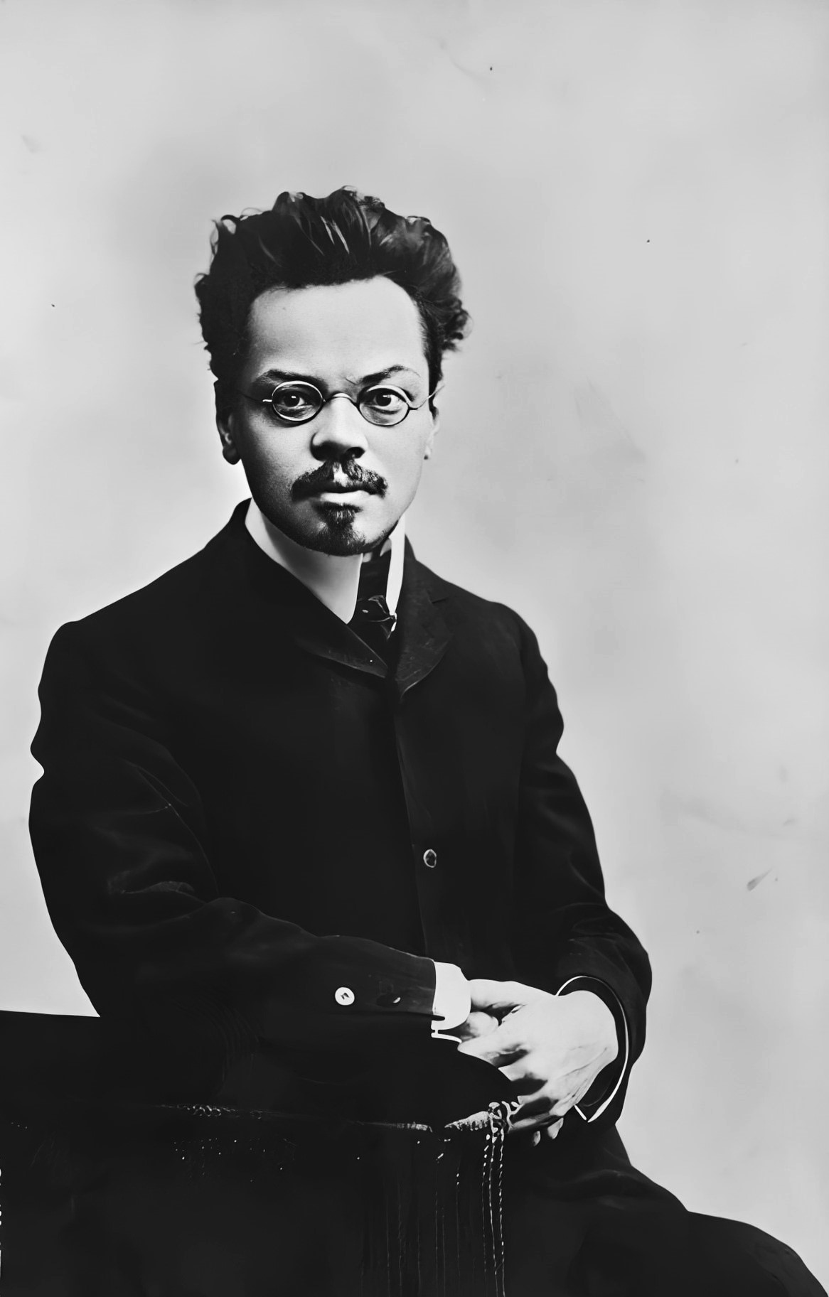 Aleksej Michajlovič Remizov